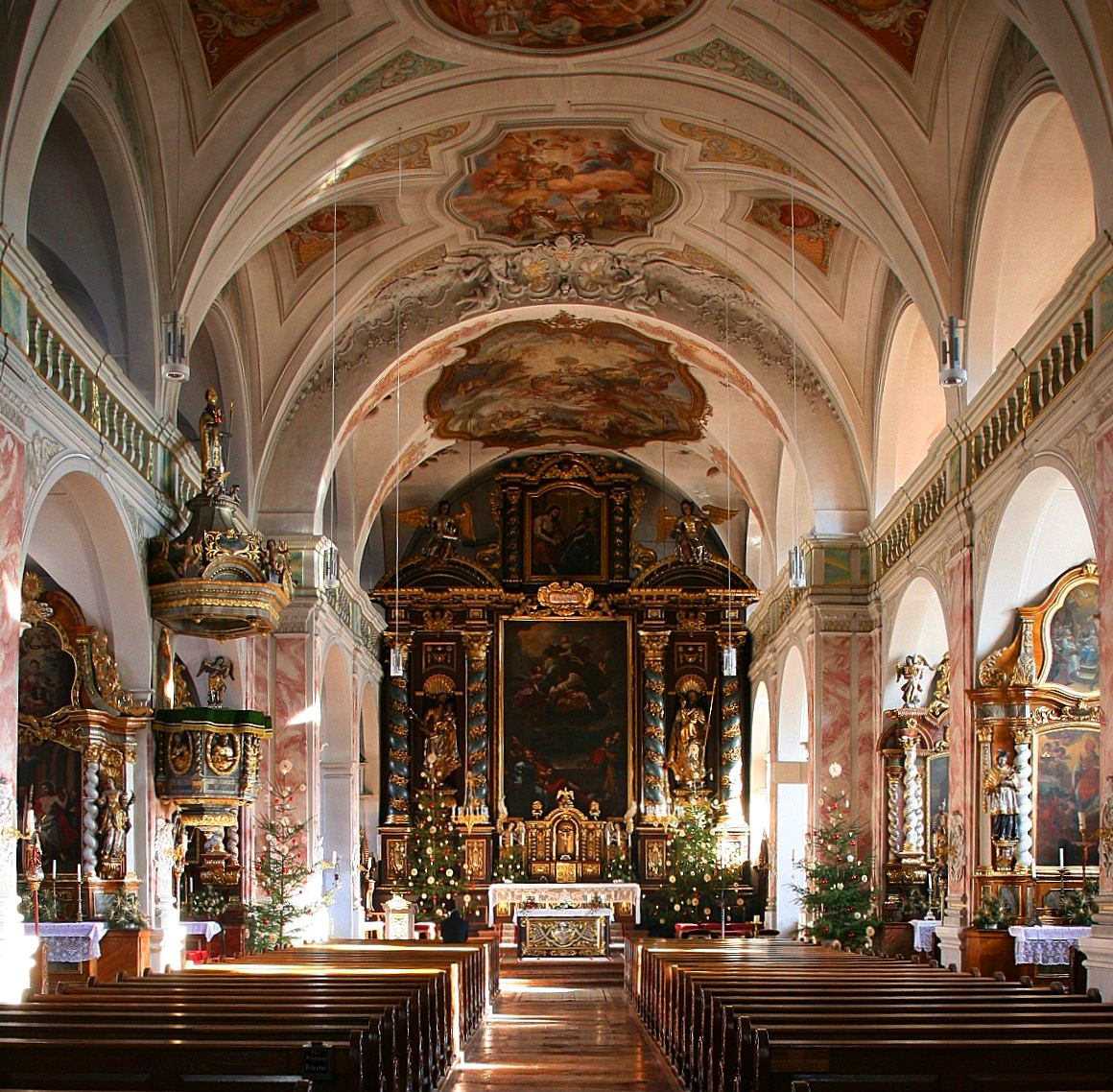 Der Innenraum der Klosterkirche Gars am Inn (Landkreis Mühldorf am Inn, Oberbayern). Eine prachtvolle barocke Raumwirkung; Blick zum Chor mit Hochaltar.